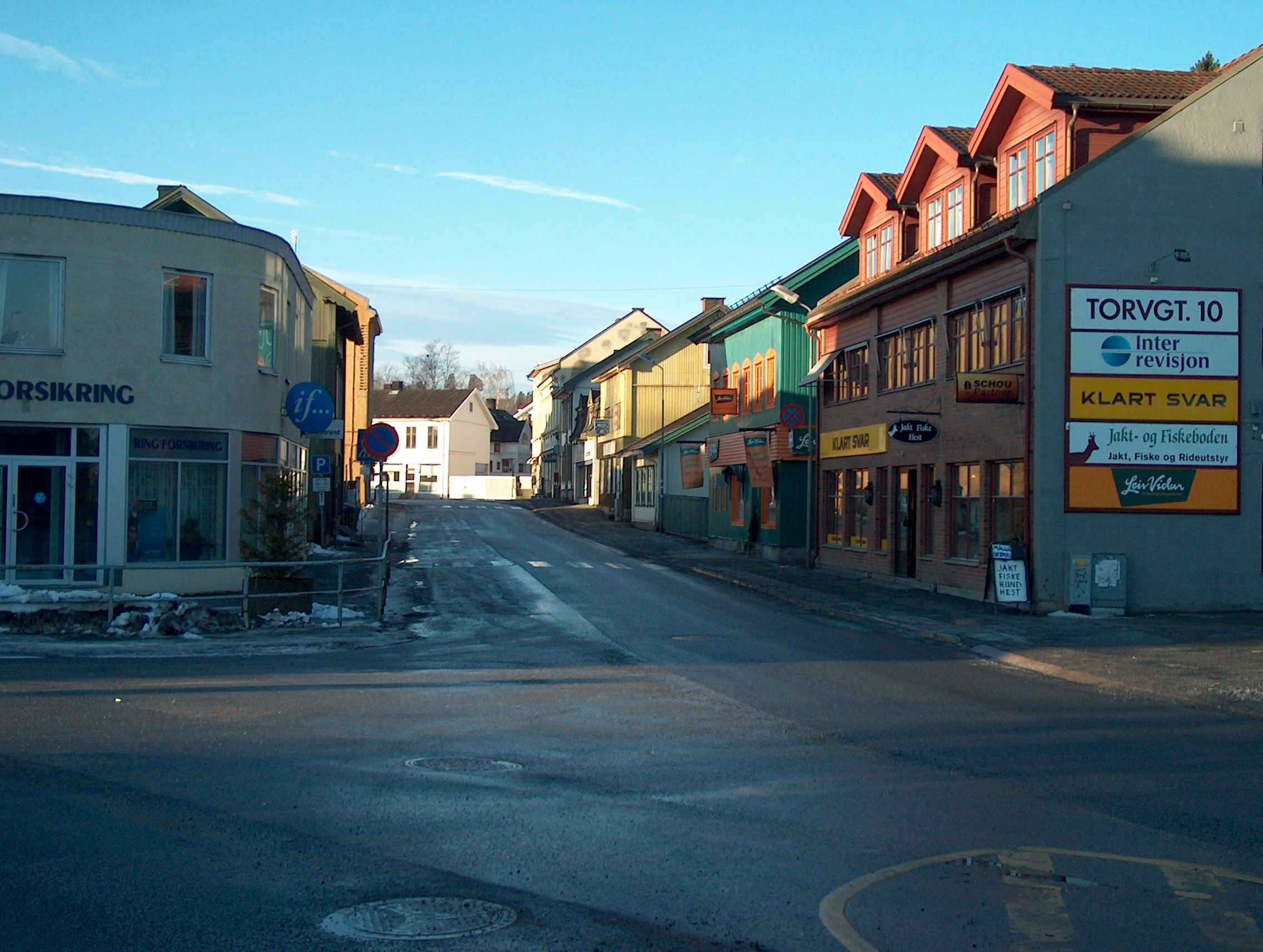 Torvgata ved Nordre torv i Hønefoss